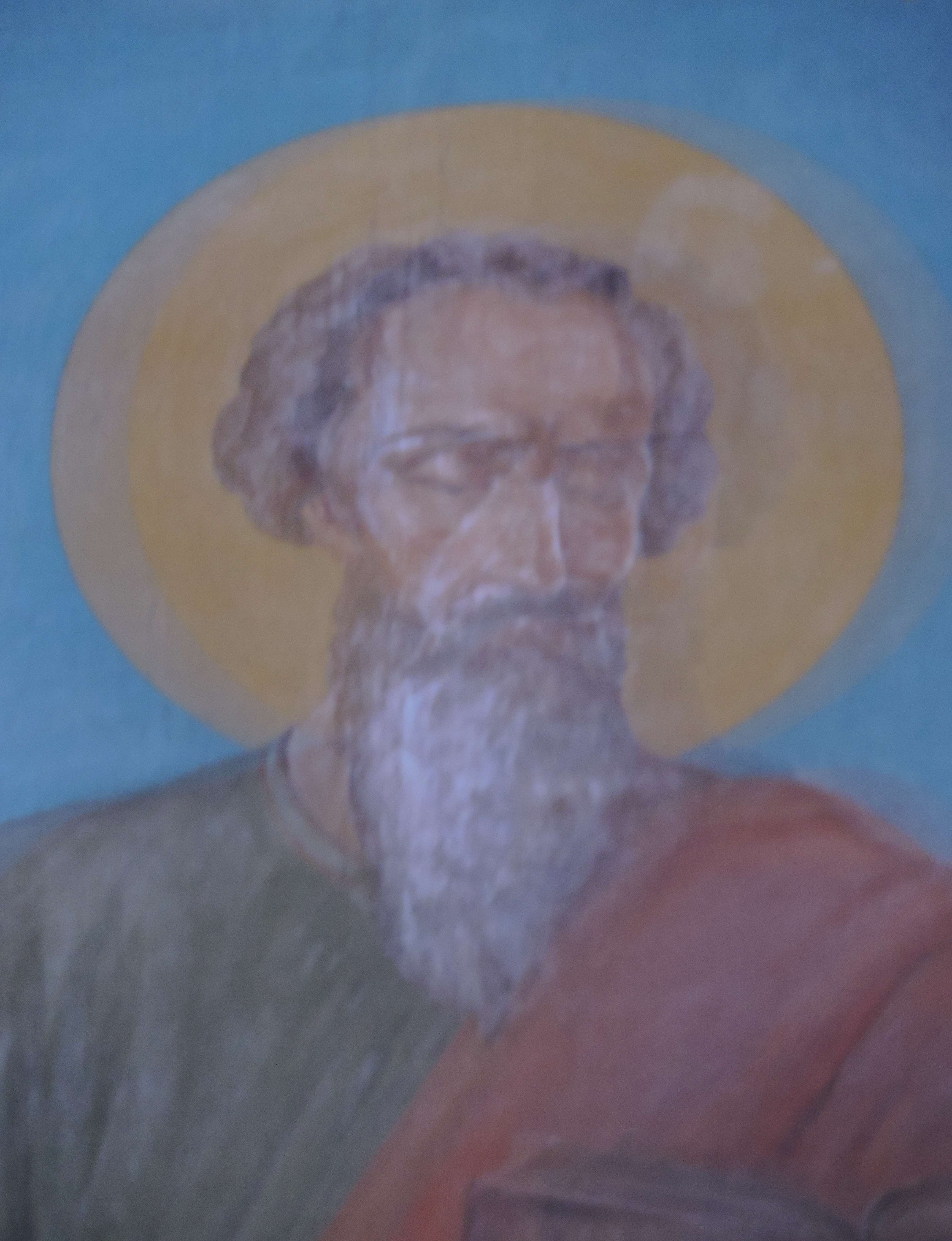 Лик апостола Павла на Павловском соборе Гатчины